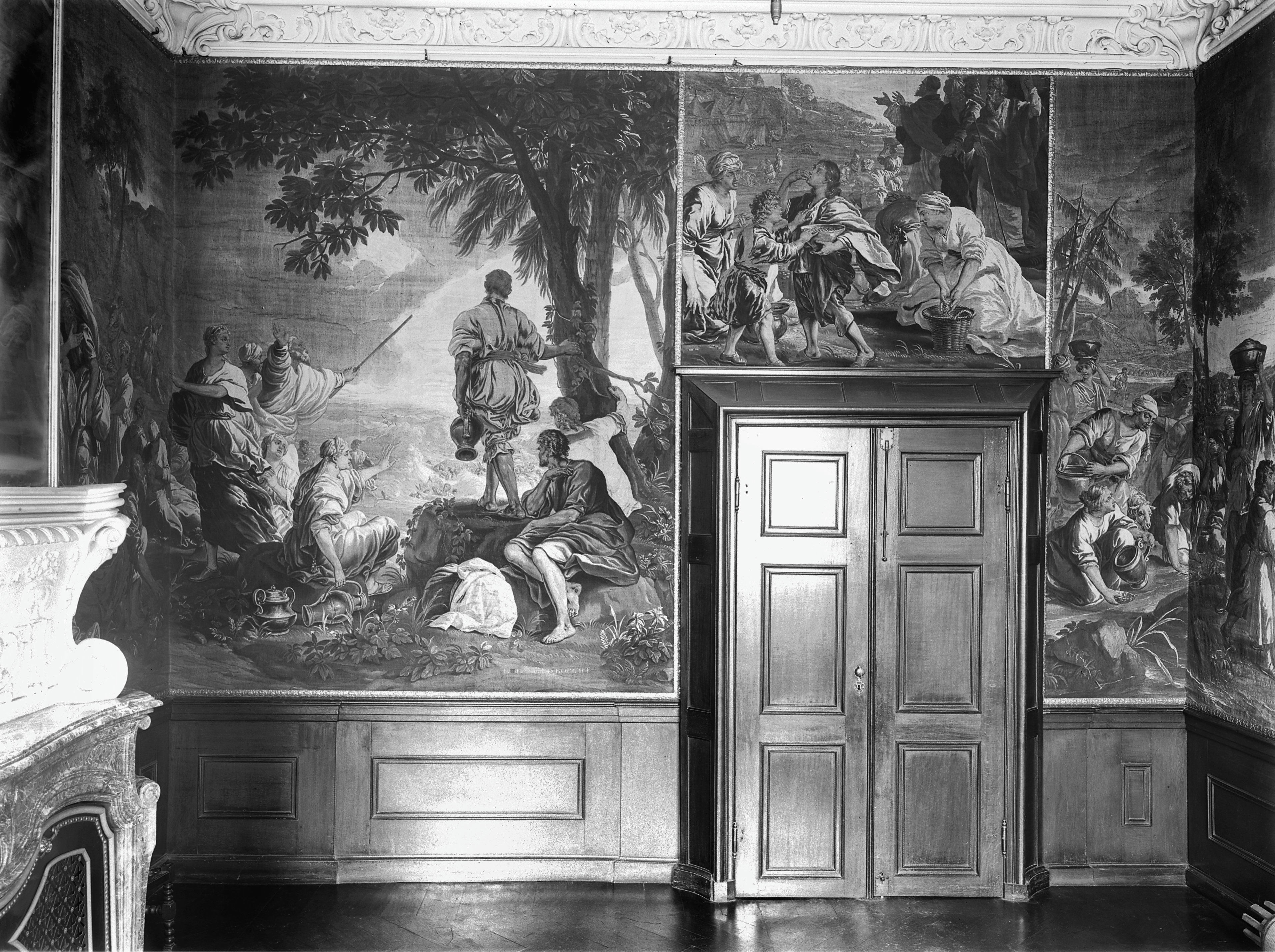 Stadhuis: Interieur leeskamer: wand